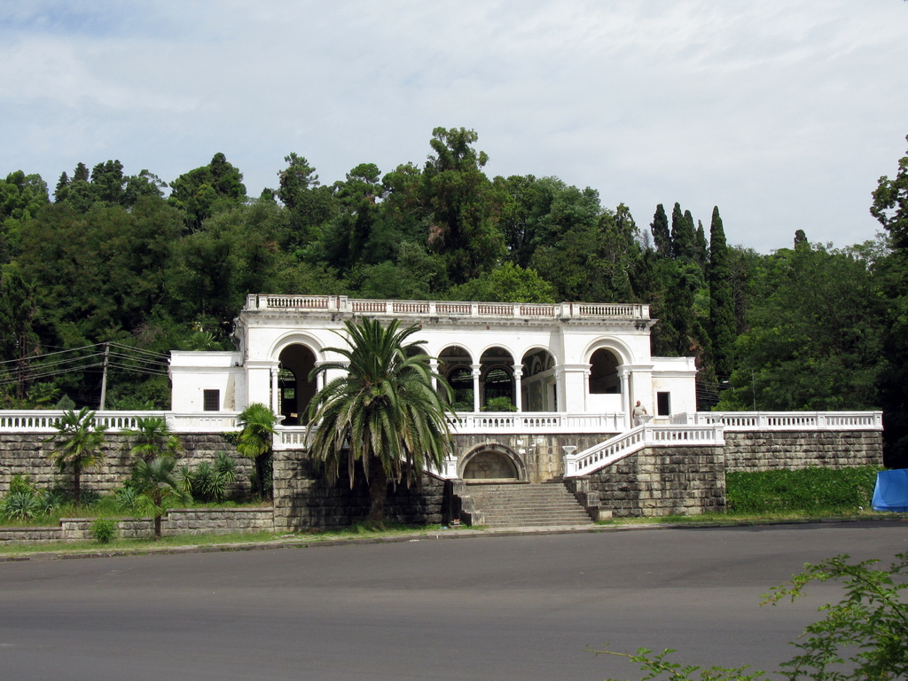 ОП Гума